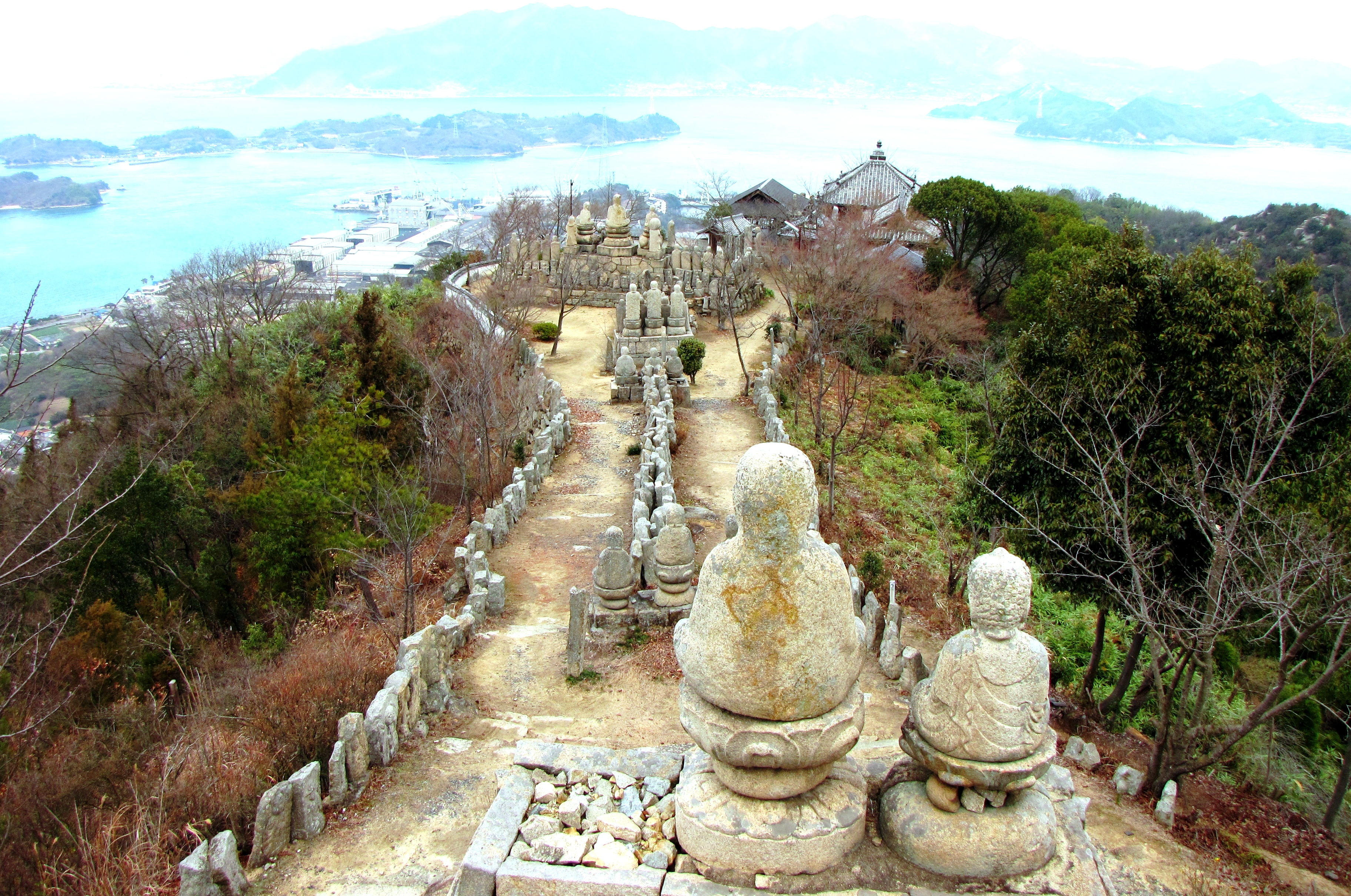 尾道市 白滝山山頂